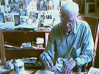 Portrait de Jean Bazaine